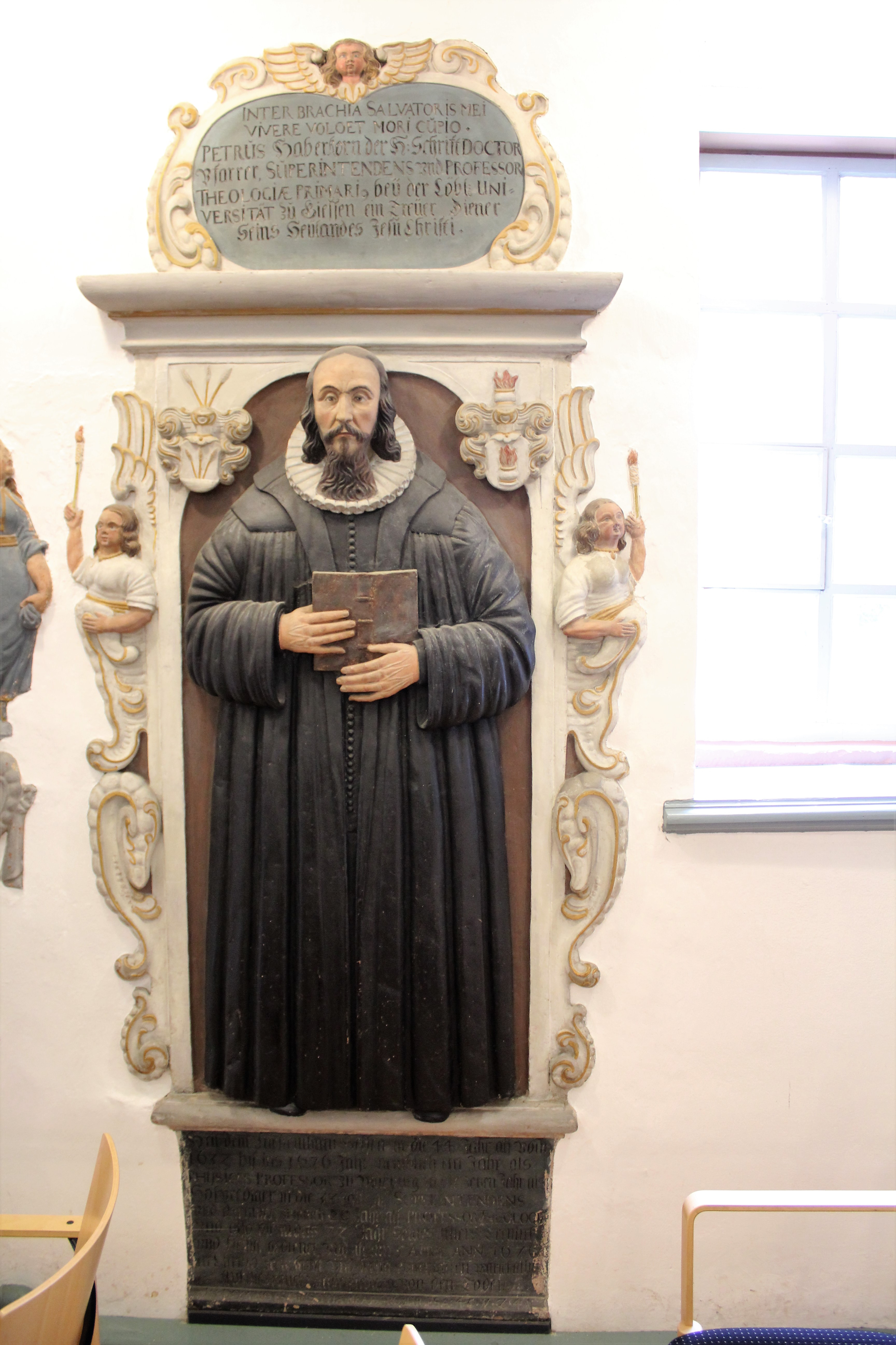 Grabstein in Kapelle Alter Friedhof, Gießen, Hessen, Deutschland